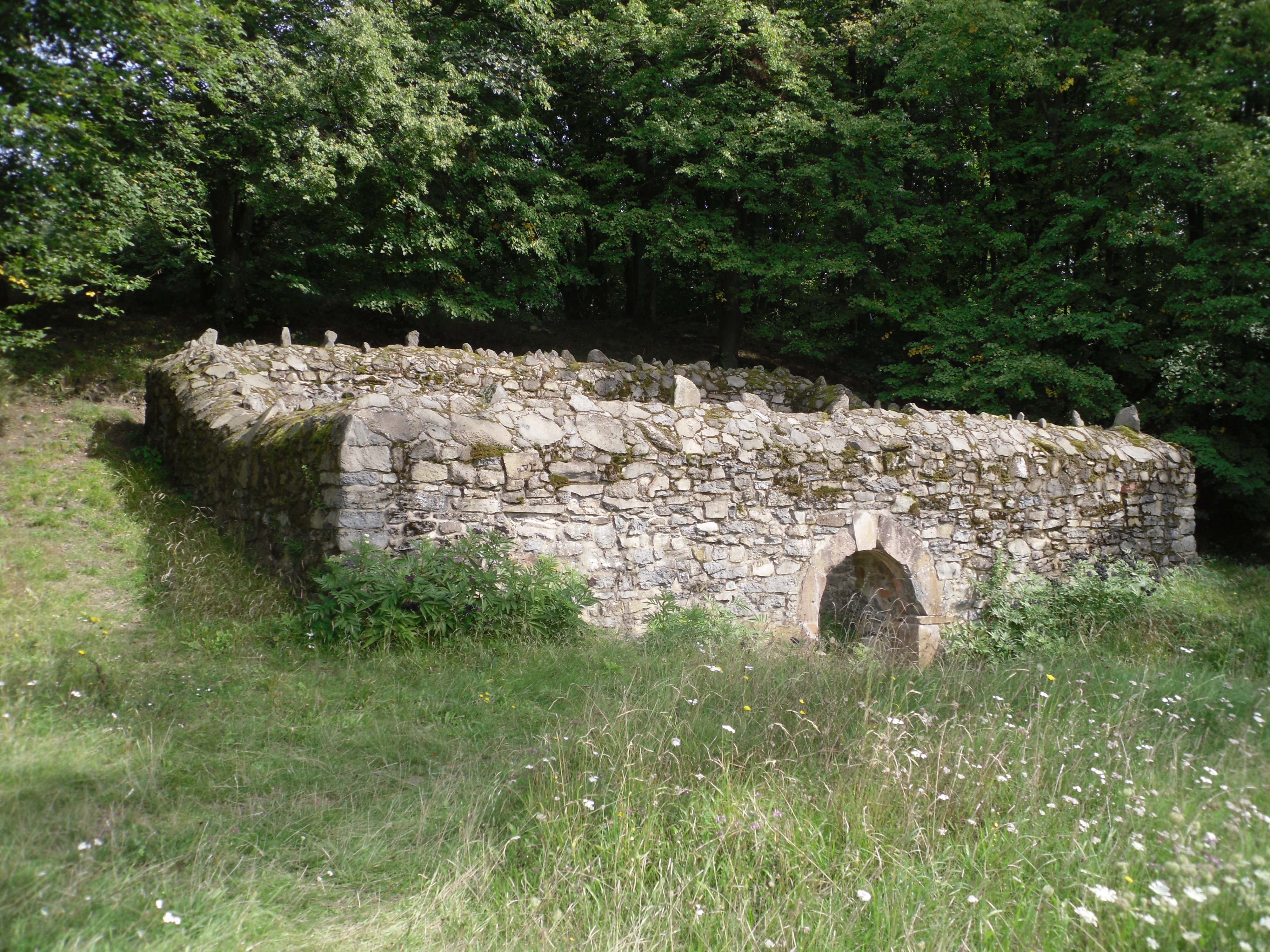 Ruine eines mittelalterlichen Burggebäudes auf dem Glauberg (keltische Siedlung)